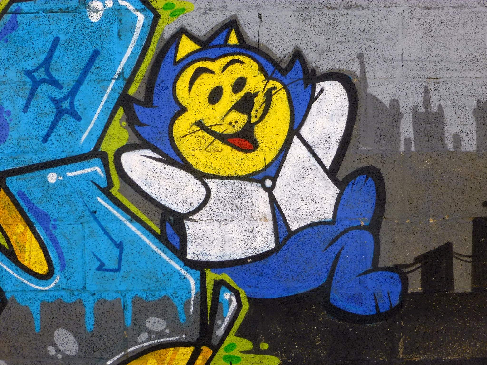 Ponferrada - graffiti & murals